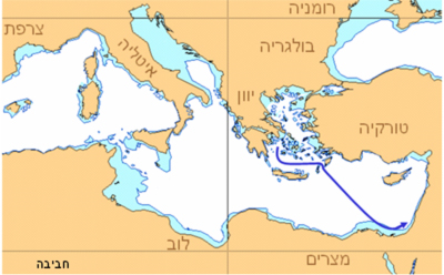 אוניית המעפילים חביבה רייק - מסלול